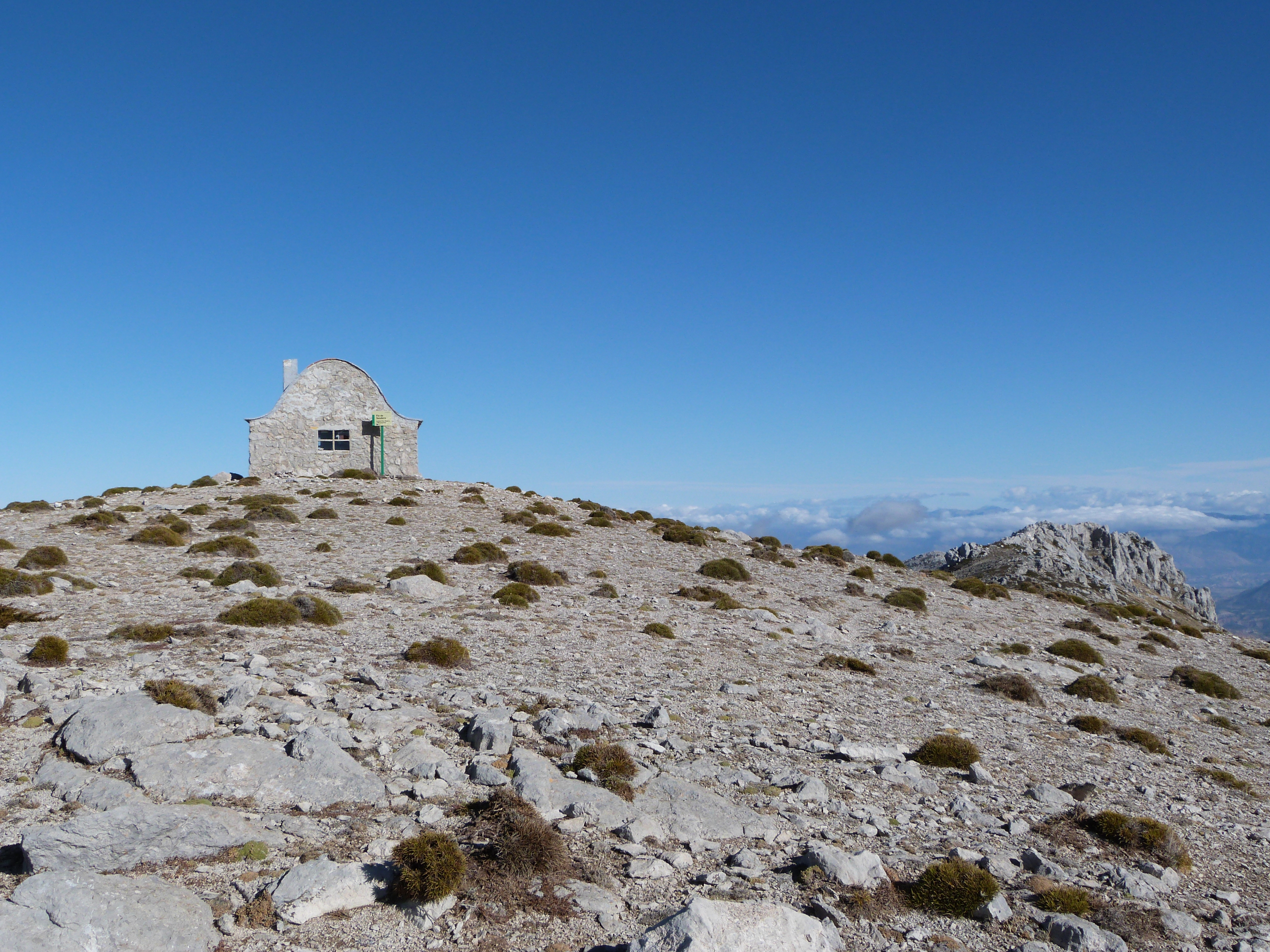 Fotografía del pico Miramundos en Sierra Mágina (Jaén).